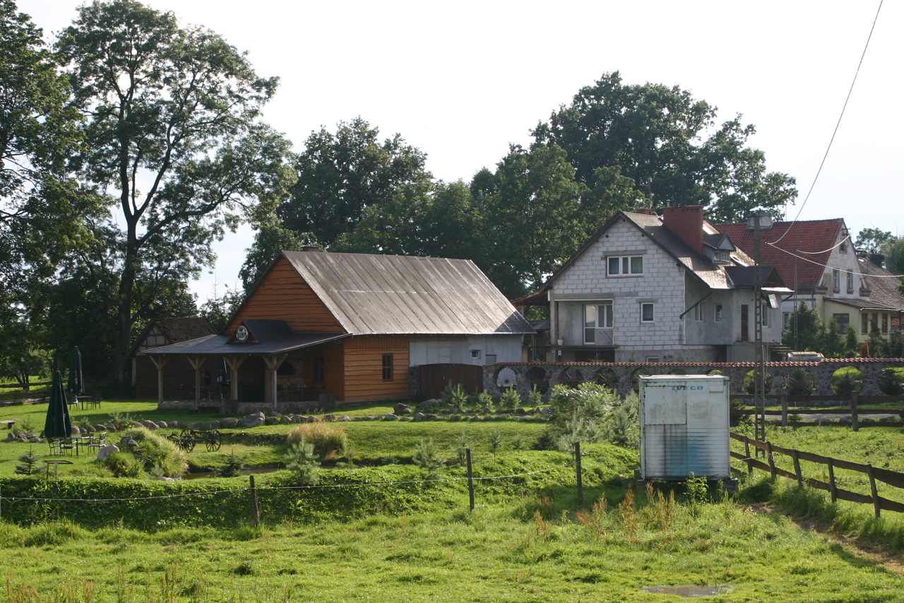 Gałwuny, Polska, powiat kętrzyński.